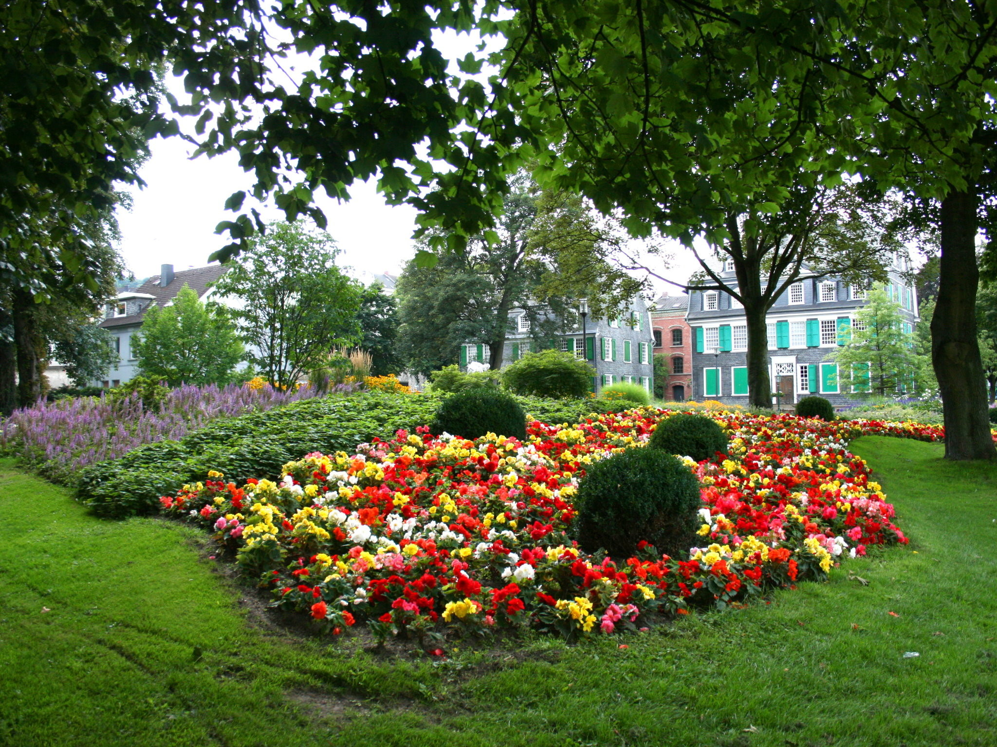 Engelsgarten im Historischen Zentrum, Wuppertal